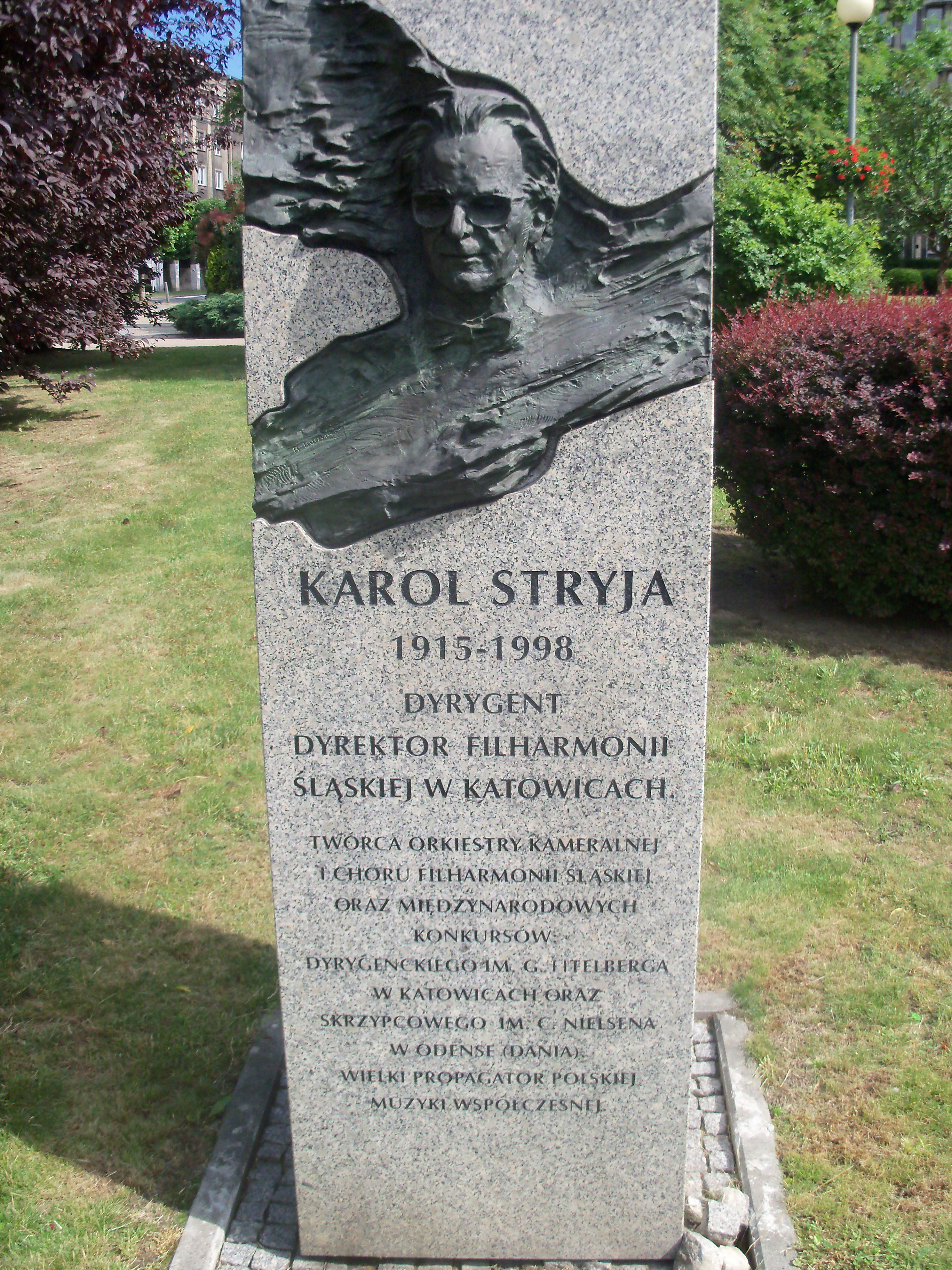 Galeria Artystyczna na placu Grunwaldzkim w Katowicach: Rzeźba przedstawiająca Karola Stryję